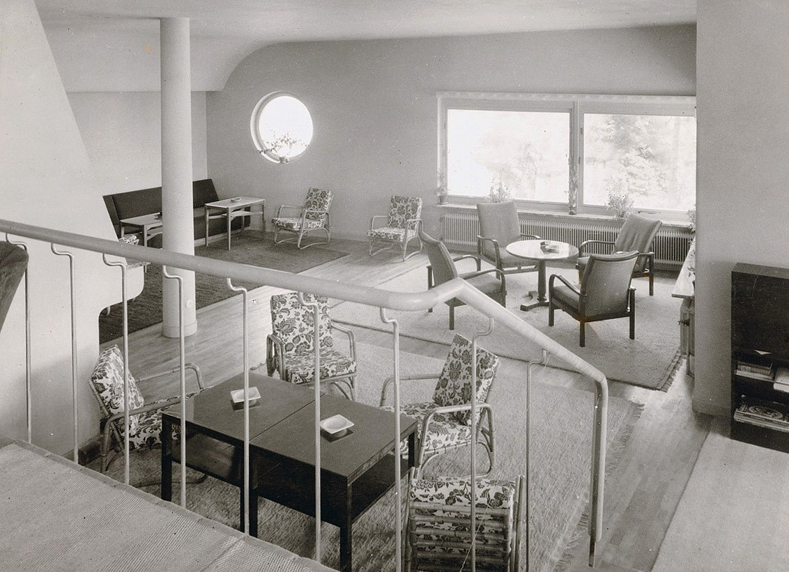 Lidingö golfklubbs klubbrum i äkta Carl Malmsten stil vid invigningen 1939